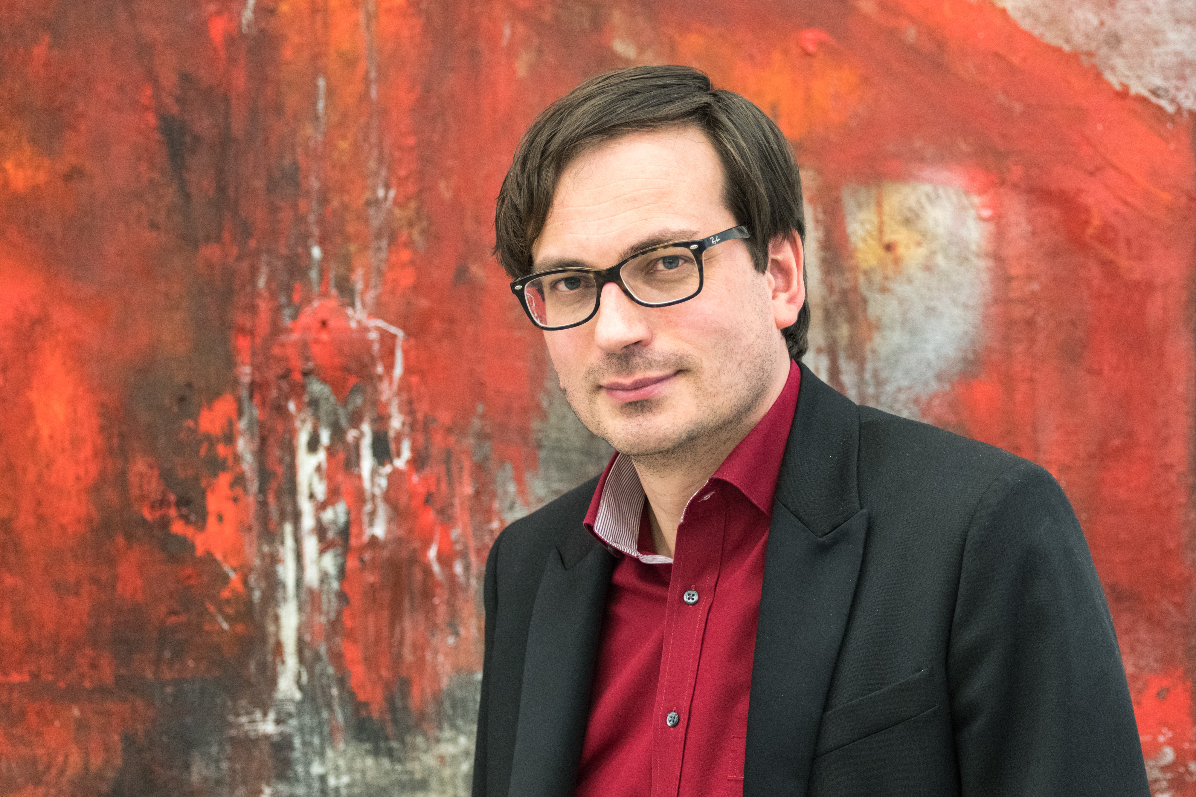 Kurator Günther Oberhollenzer bei der Eröffnung der Ausstellung Lena Göbel und Maria Moser im Museum Angerlehner in Thalheim bei Wels